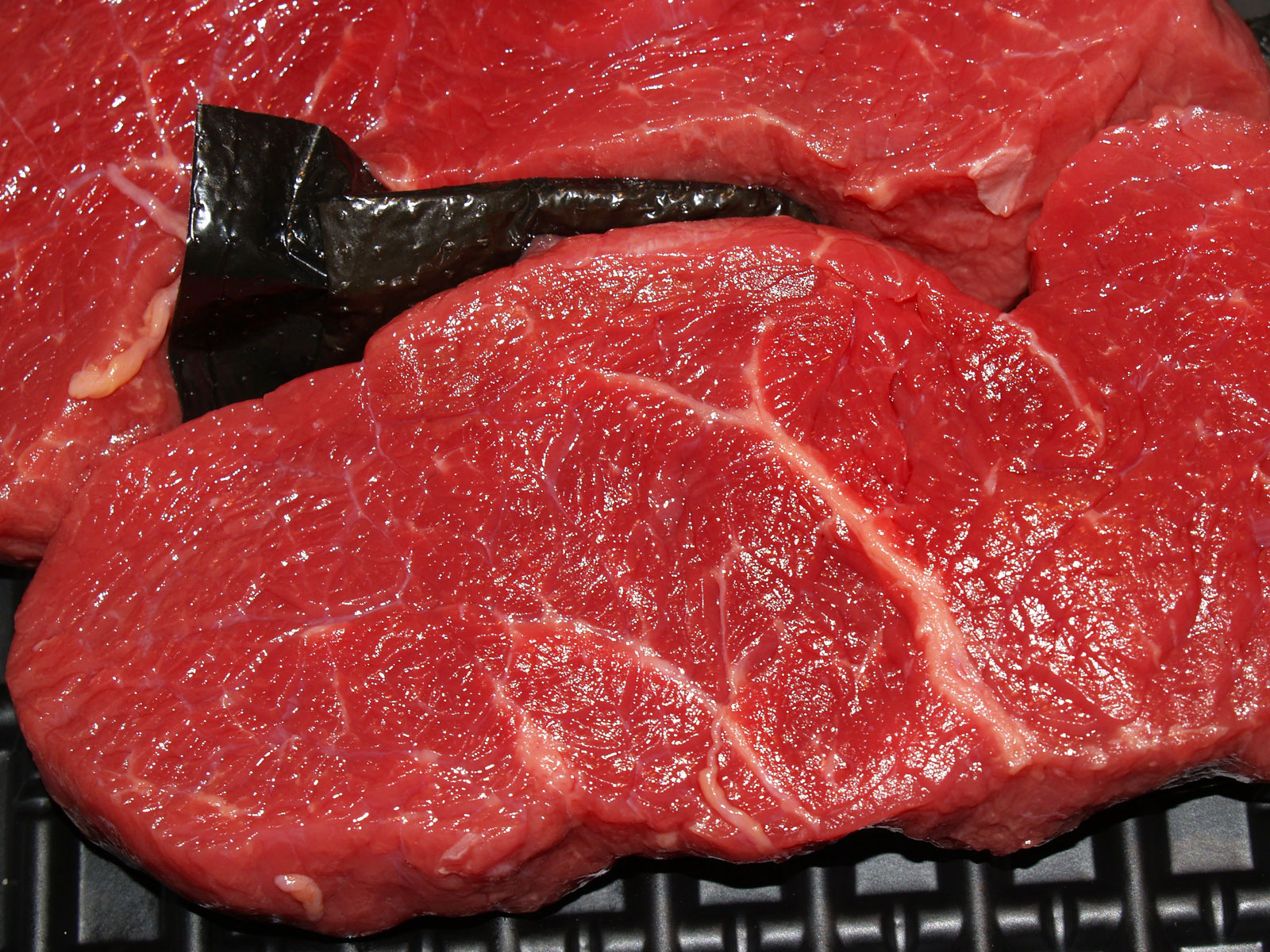 Engelsk bøf